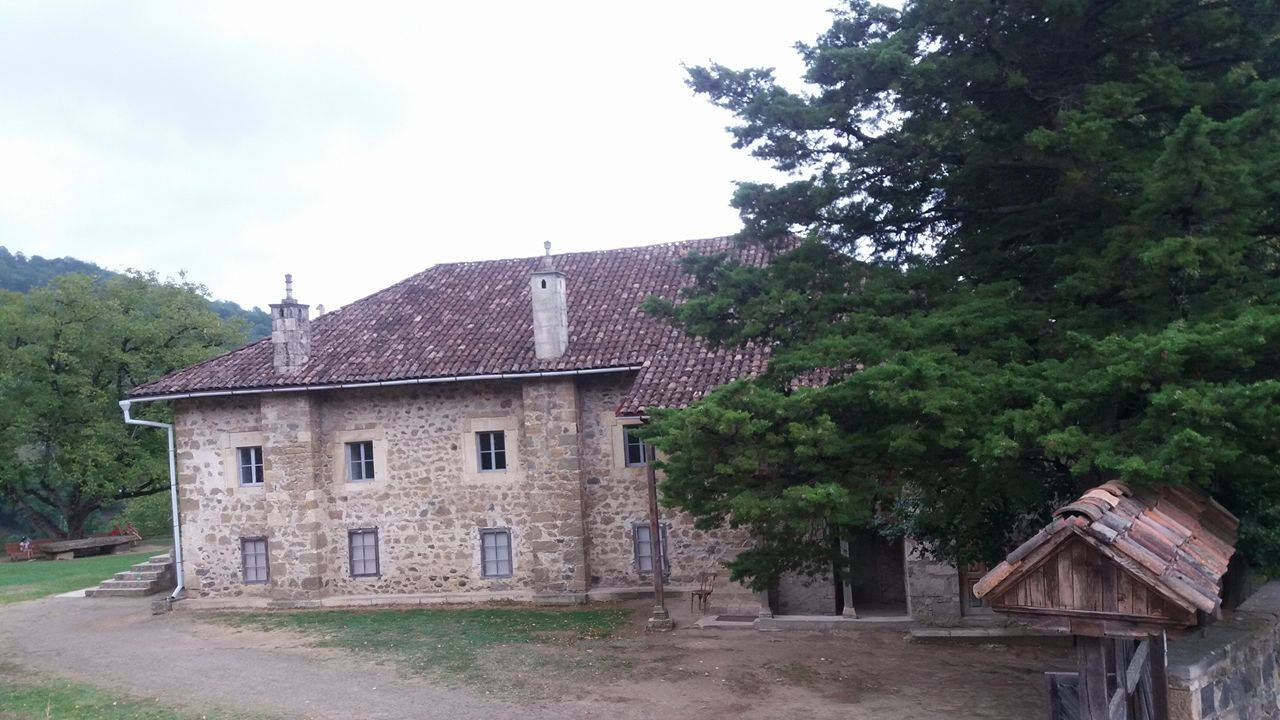 აკაკი წერეთლის სახლ-მუზეუმი